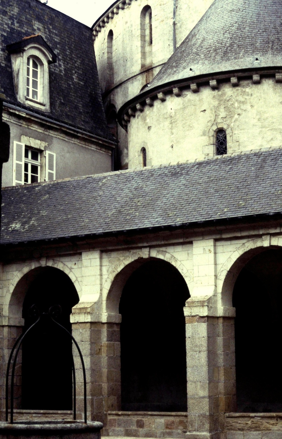 Finistere Quimperle Abbaye Sainte-Croix